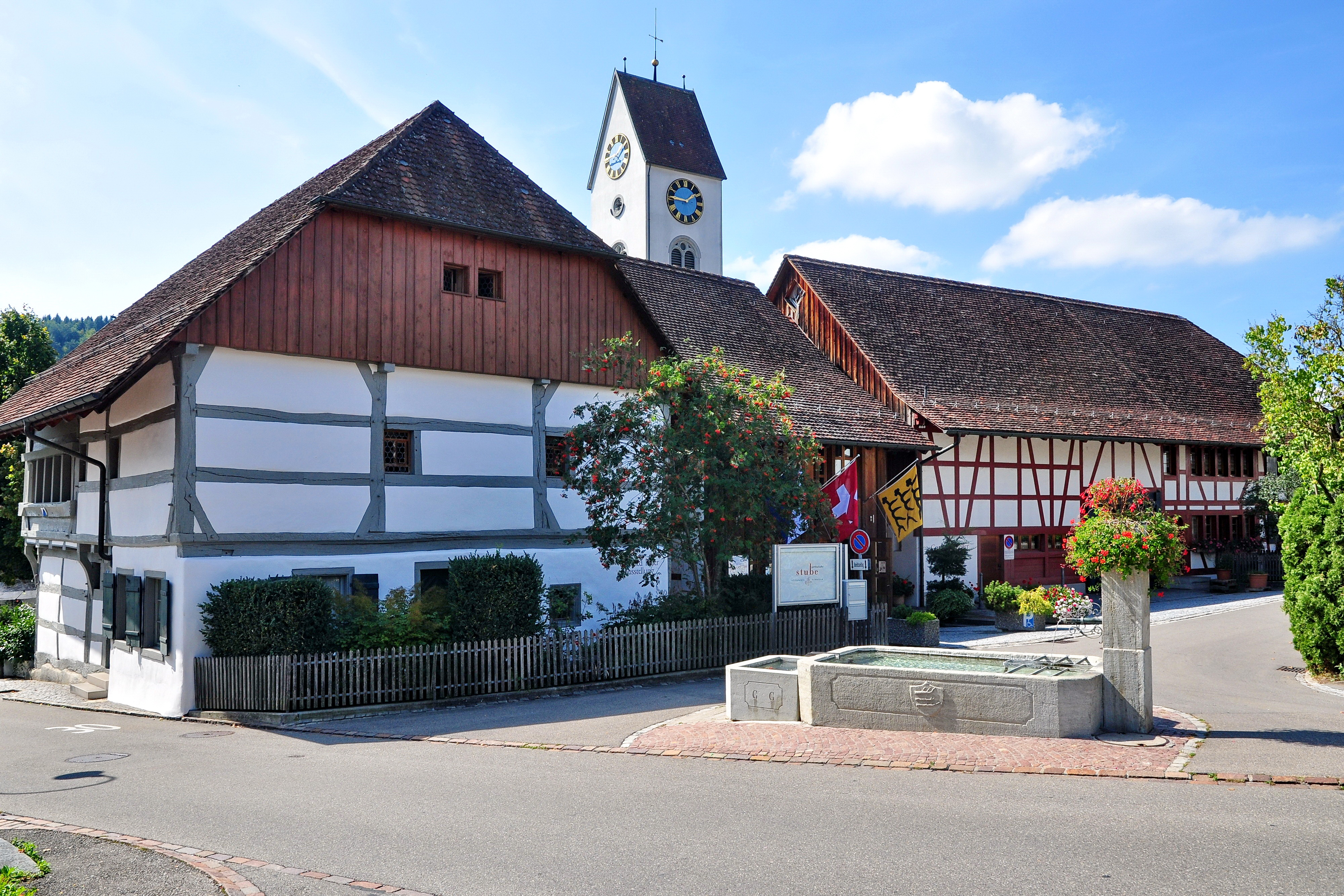 Klingelehaus (Gottfried-Keller-Zentrum), Gottfried-Keller-Strasse 8 in Glattfelden (Switzerland)